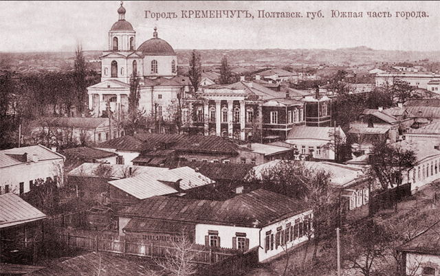 Postcards of old Kremenchuk. Південна частина міста Кременчука.